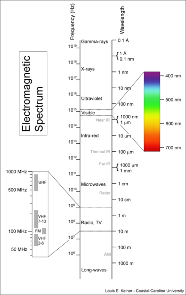 Espectru electromagneticu